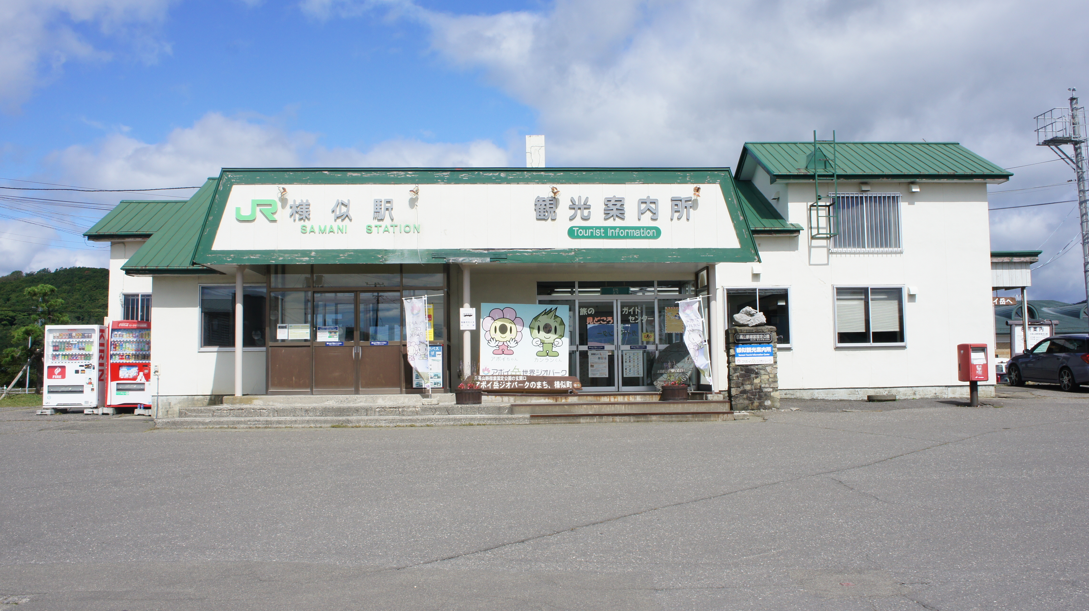 JR日高本線・様似駅の駅舎